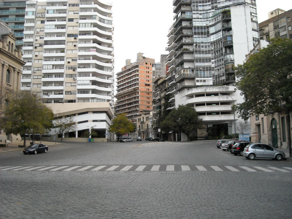 Bajada Sargento Cabral